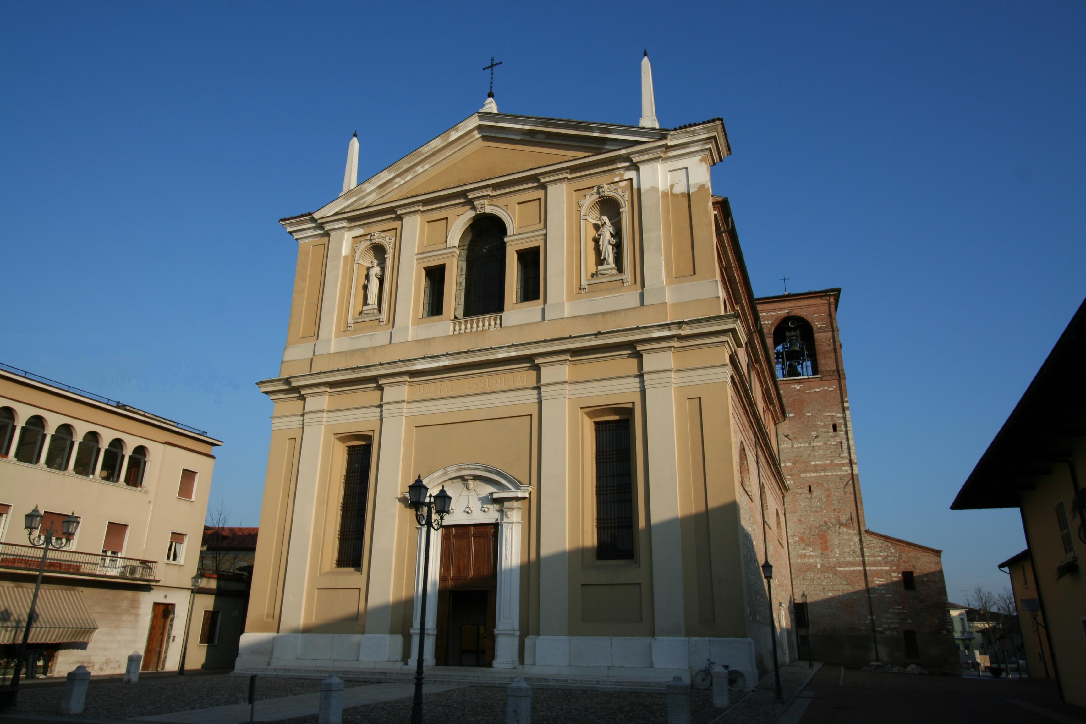 Chiesa Parrocchiale GHEDI XVIIsec.